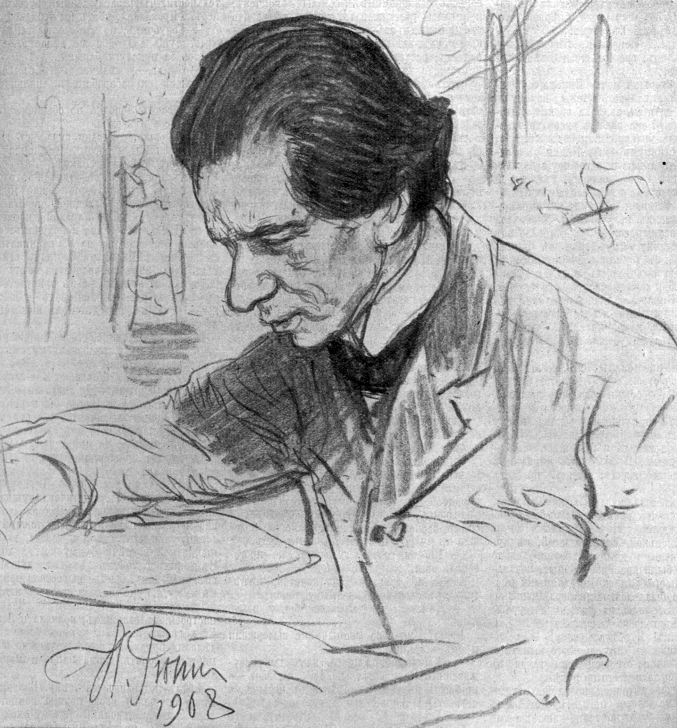 К.Н. Льдов. Набросок с натуры И. Репина для журнала "Огонёк"